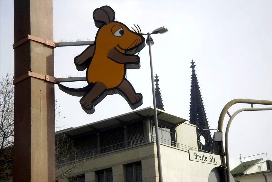 Bildbeschreibung: "Die Maus" am WDR-Gebäude, Köln, Breite Straße Quelle: eigenes Foto Fotograf/Zeichner: bodoklecksel 19:04, 20. Apr 2006 (CEST) Datum: April 2006 Sonstiges: ...